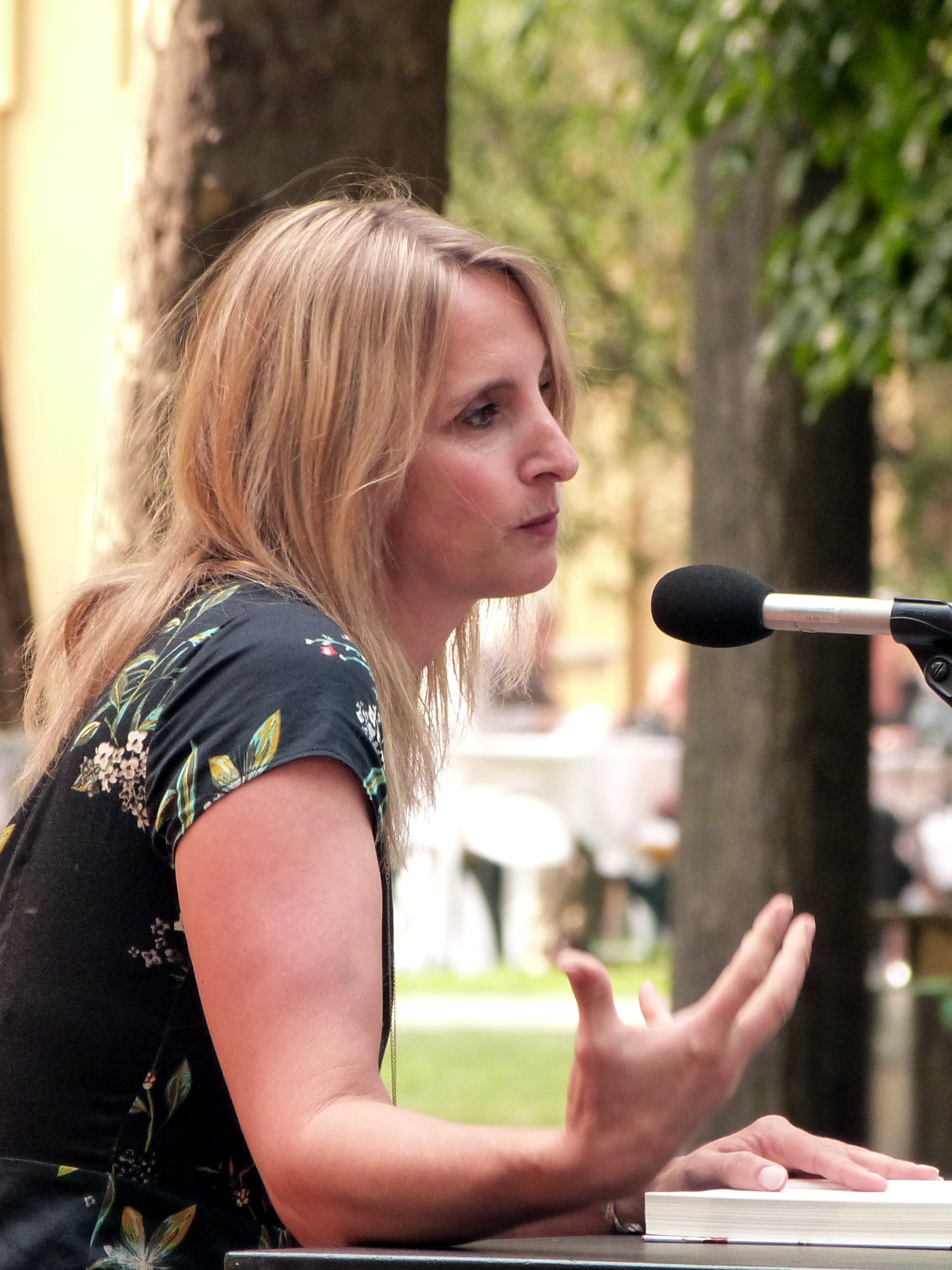 Die Schriftstellerin Annette Mingels bei einer Lesung auf dem Erlanger Poetenfest 2017.